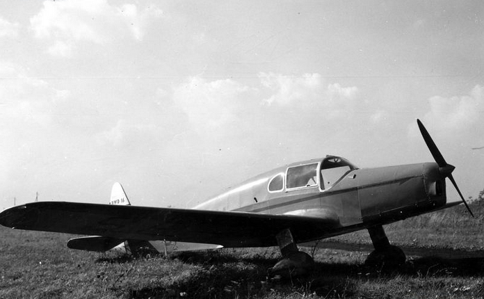 Samolot sportowy RWD 16